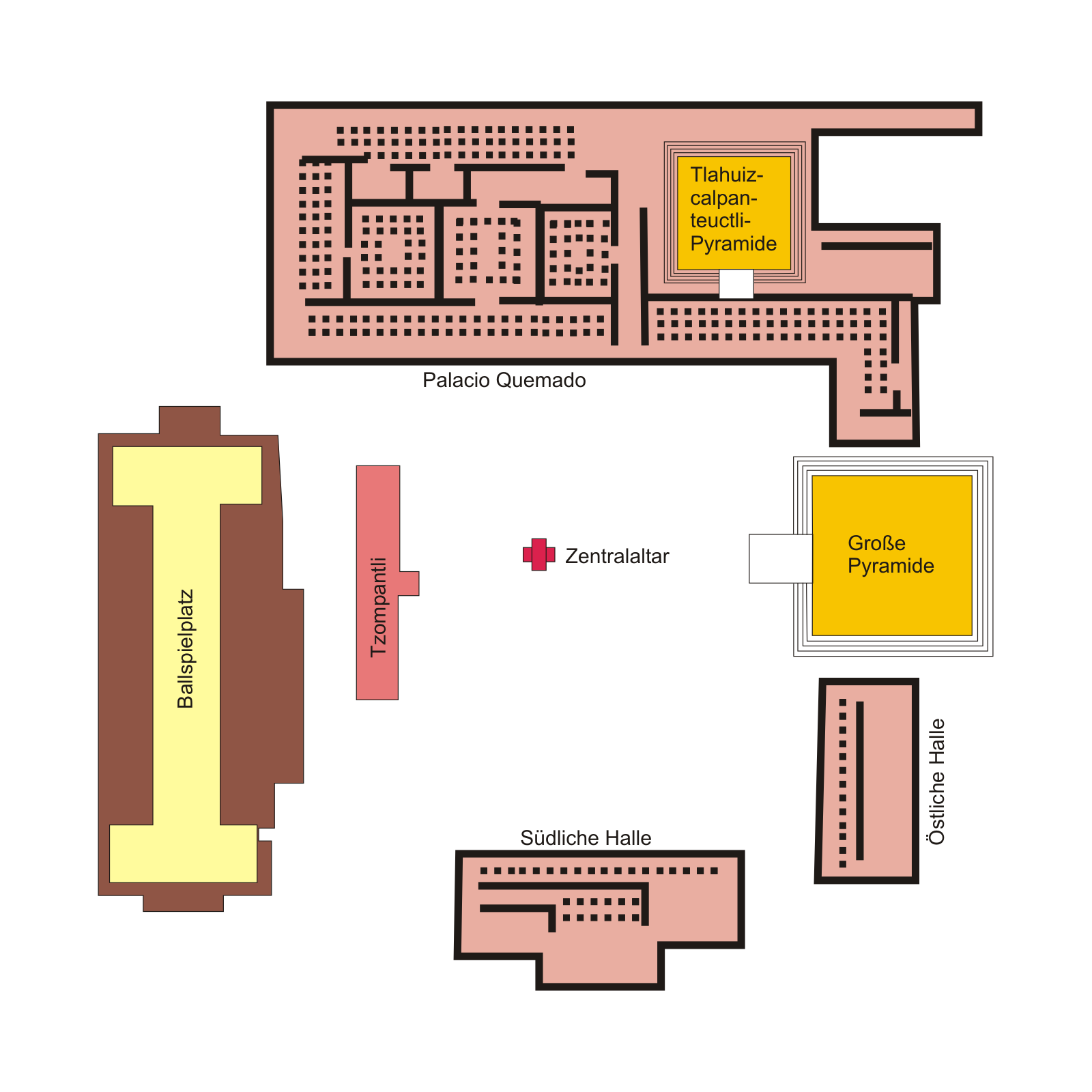 Tula, Hidalgo, Mexiko: Plan des Zeremonialzentrums "Tula GRande"